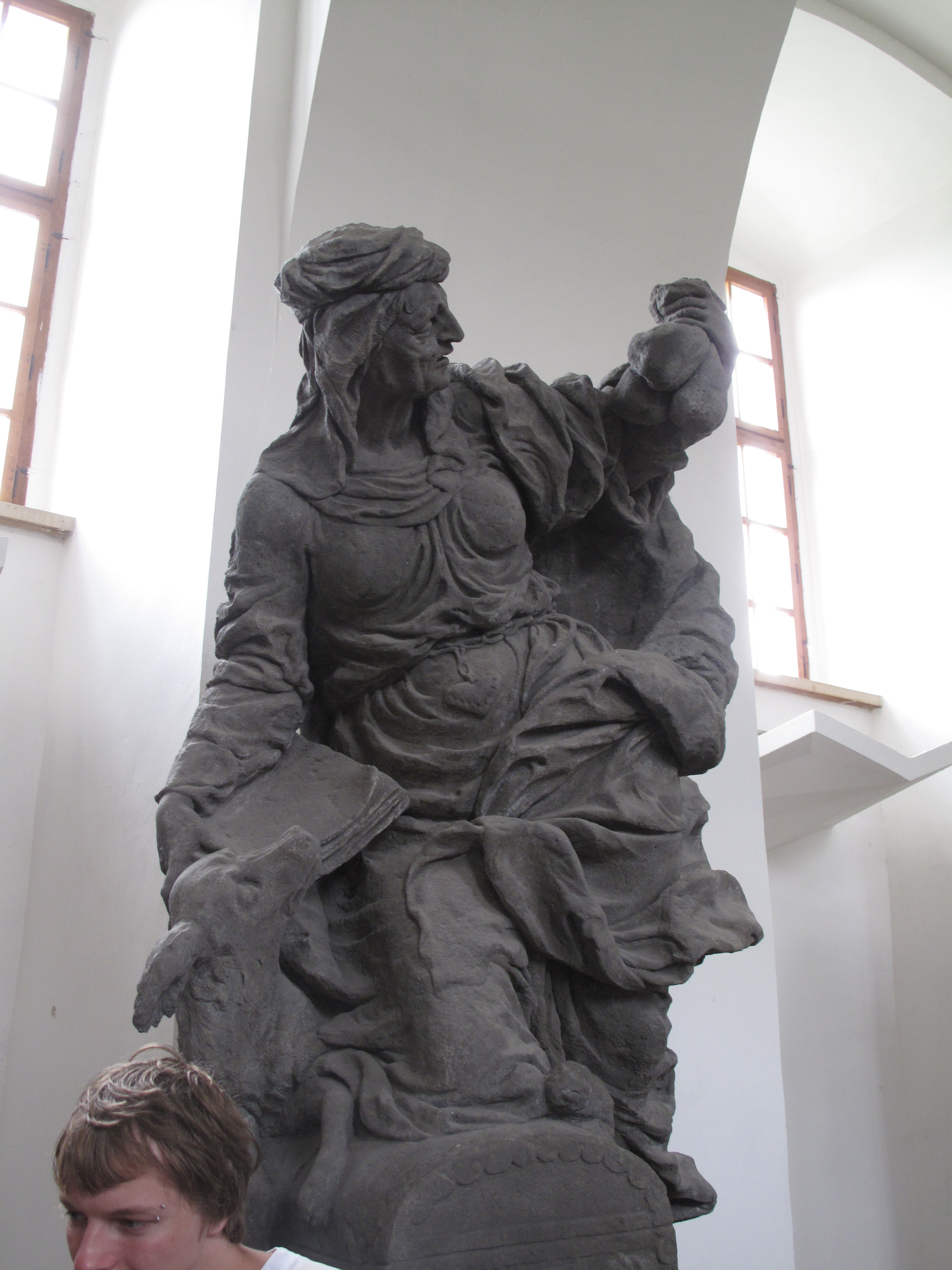 Matyáš Bernard Braun, Lakomství (Neřesti) - originál lapidárium Kuks